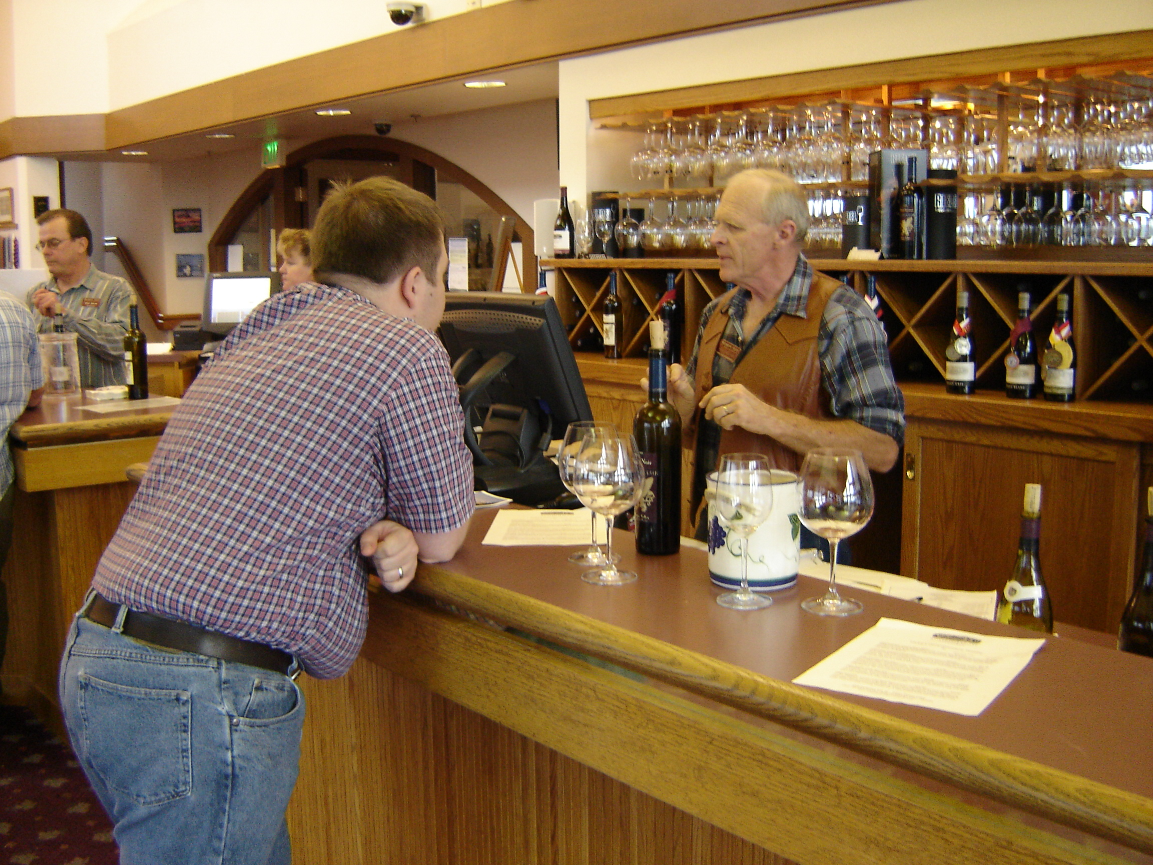 Mat ordering wine in Salem, OR